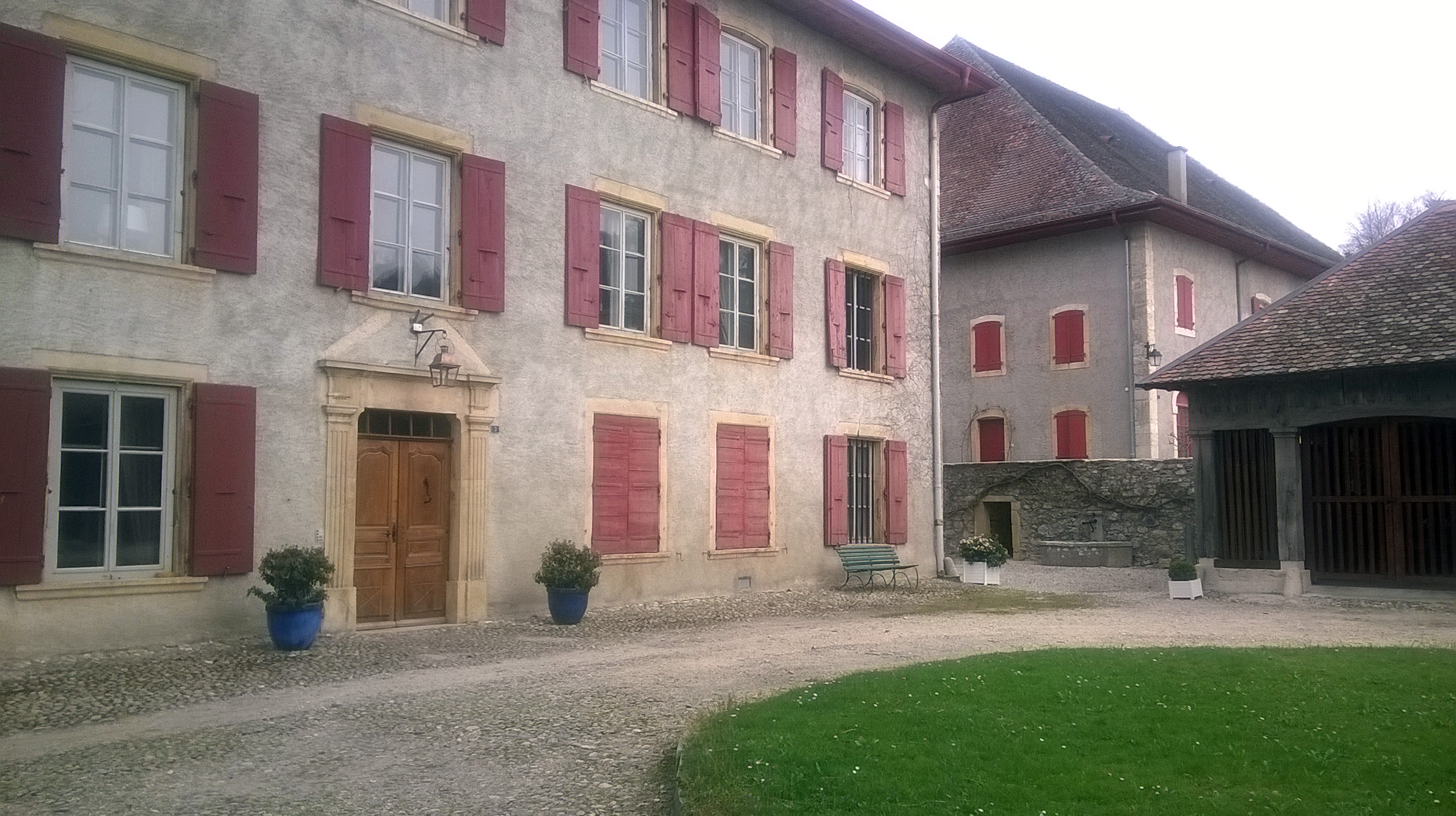 Seigneurie d'Eclépens, Éclépens, Fassade